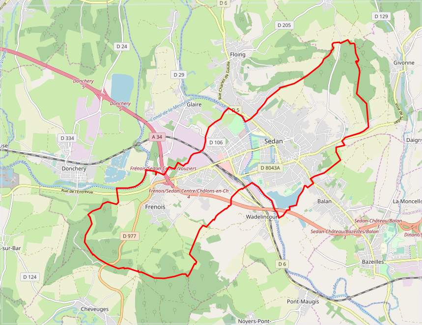 carte réalisée sur umap This map may be incomplete, and may contain errors. Don't rely solely on it for navigation.